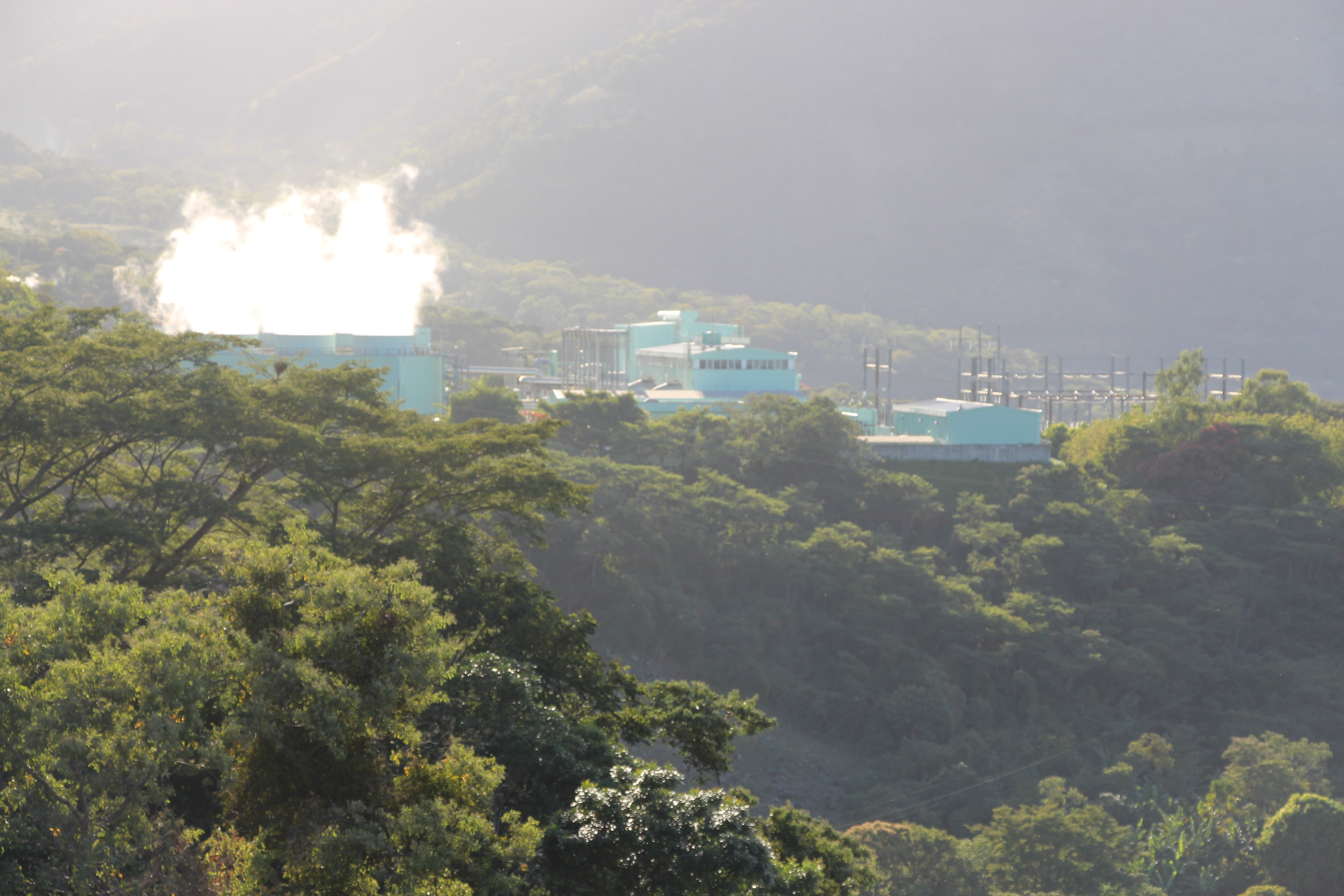 Central Geotérmica de Berlín, El Salvador